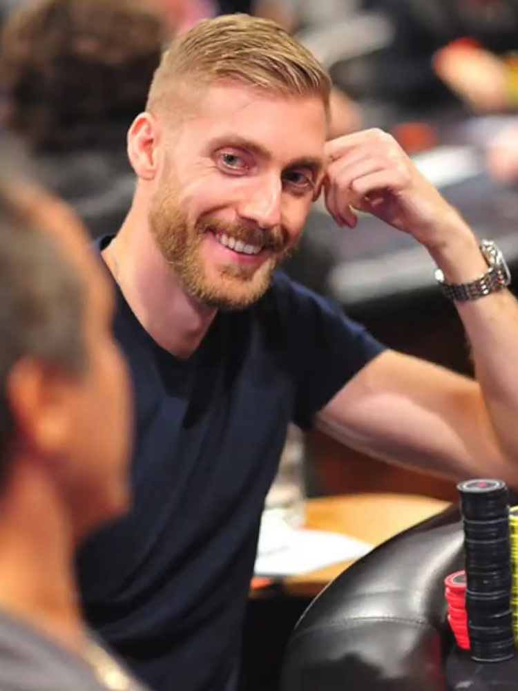 Manig Löser bei der WPT Montreal